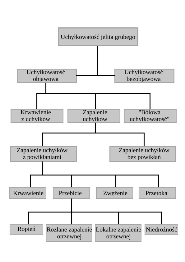 opracowano wg Frede KE, Harder F. Diverticulose, Diverticulitis. w: Chirurgische Gastroenterologie (wyd. Siewert JR i inni) Tom 2 s. 1068-1080, Springer Verlag Berlin, Heidelberg, New York, 1990.